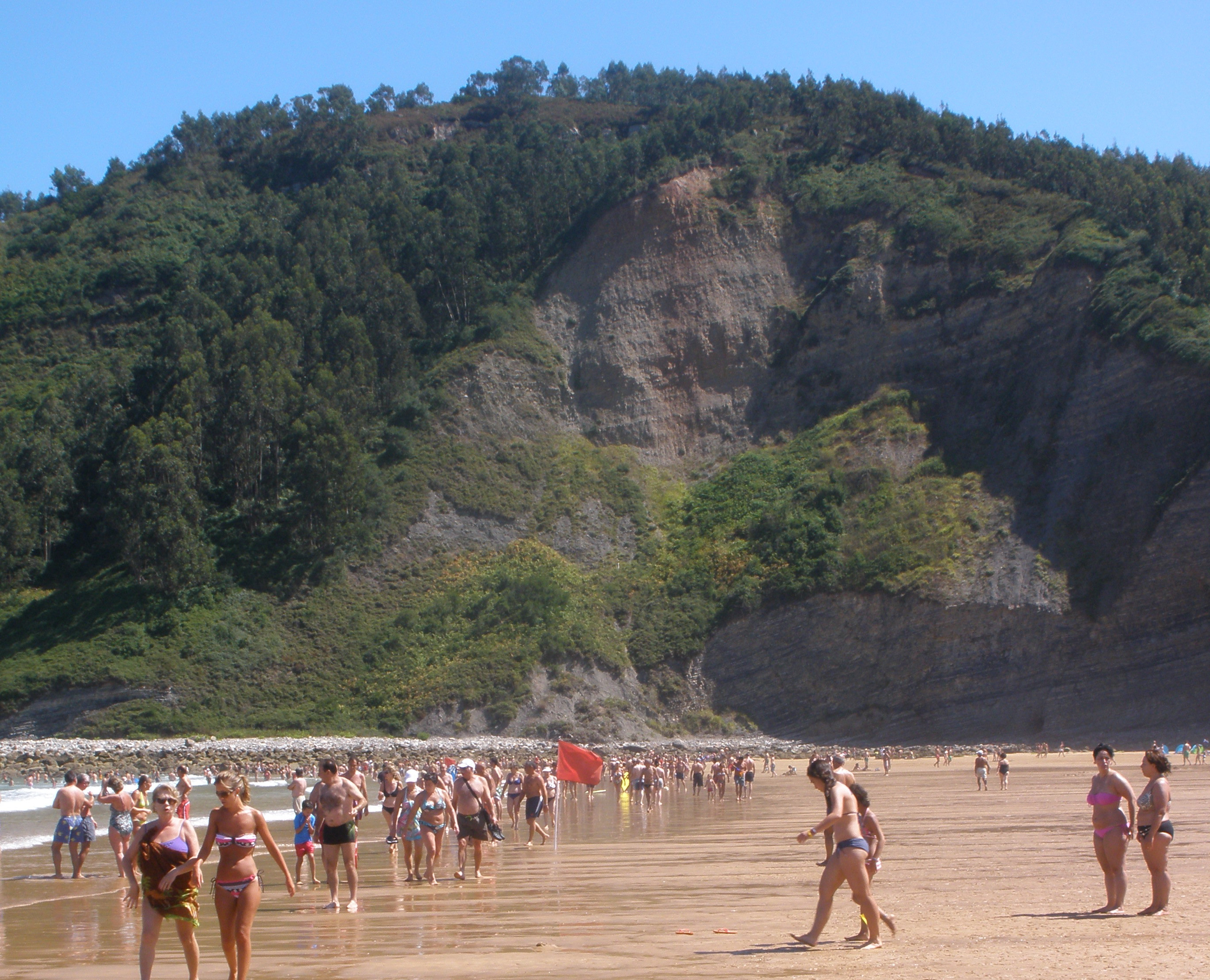 Monte Rodiles con la playa de Rodiles en primer término, en Villaviciosa, Asturias